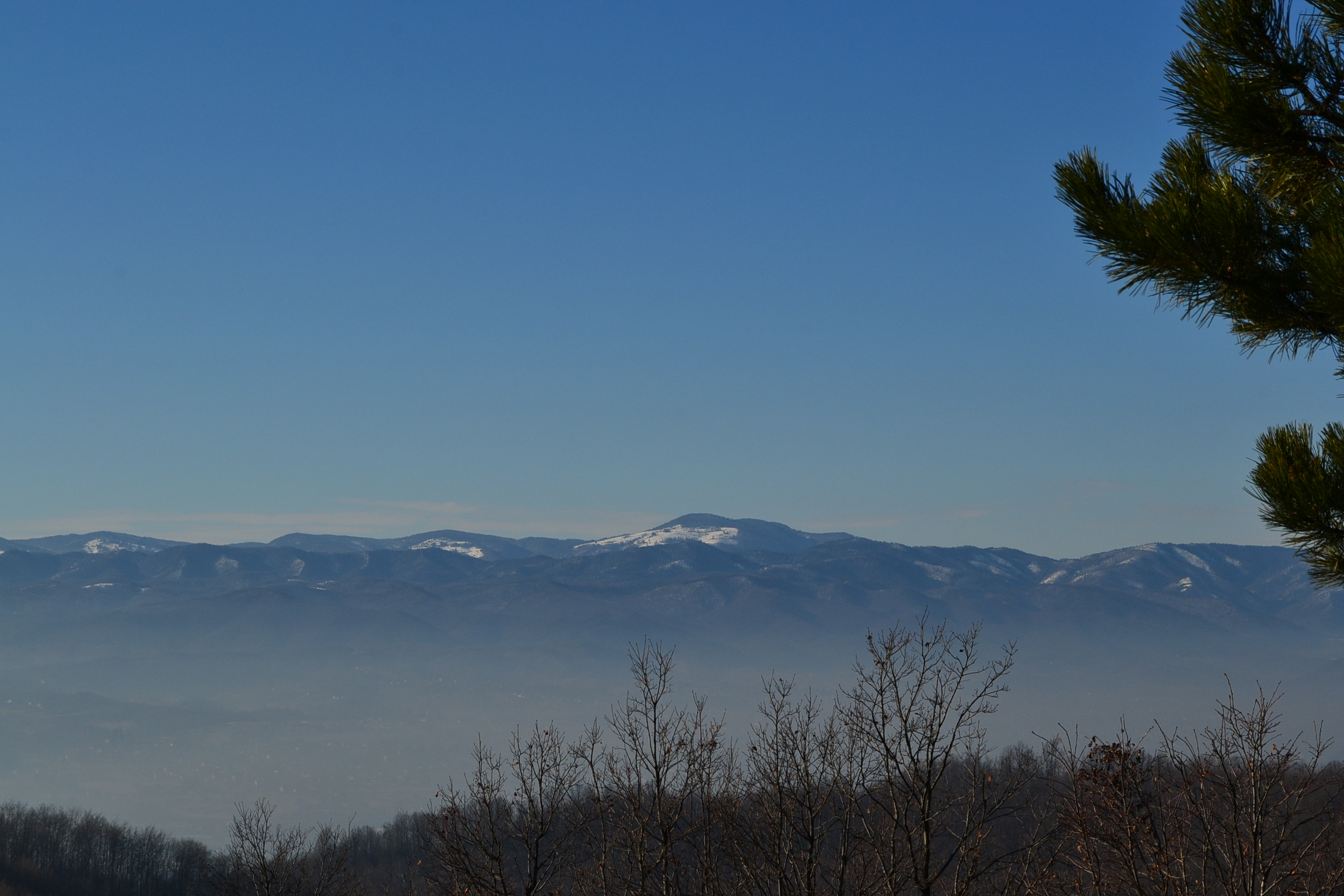 Бисер главица (1383), са Очаушким Лицем, на хоризонту изнад града Теслића